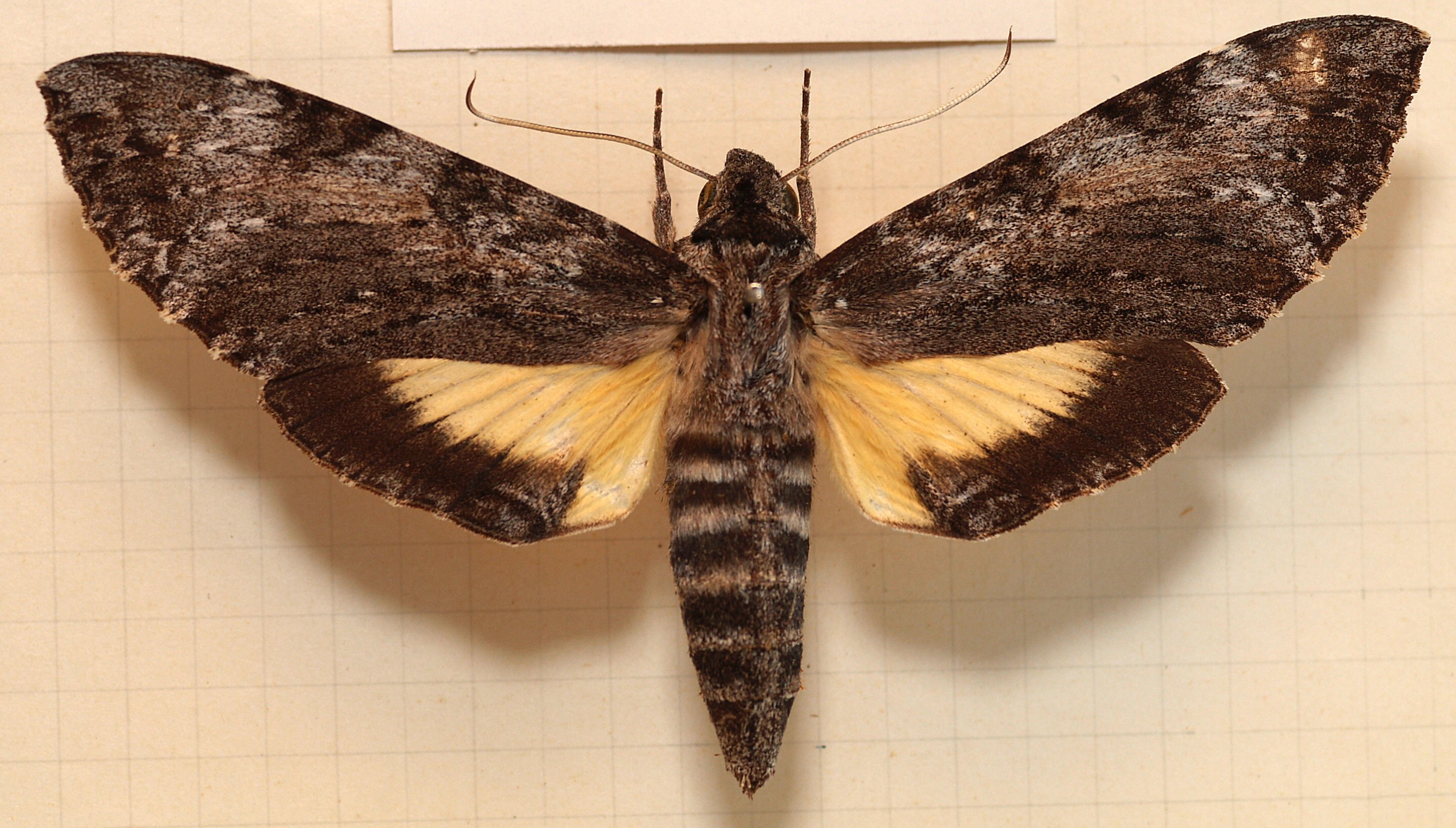 Isognathus rimosa